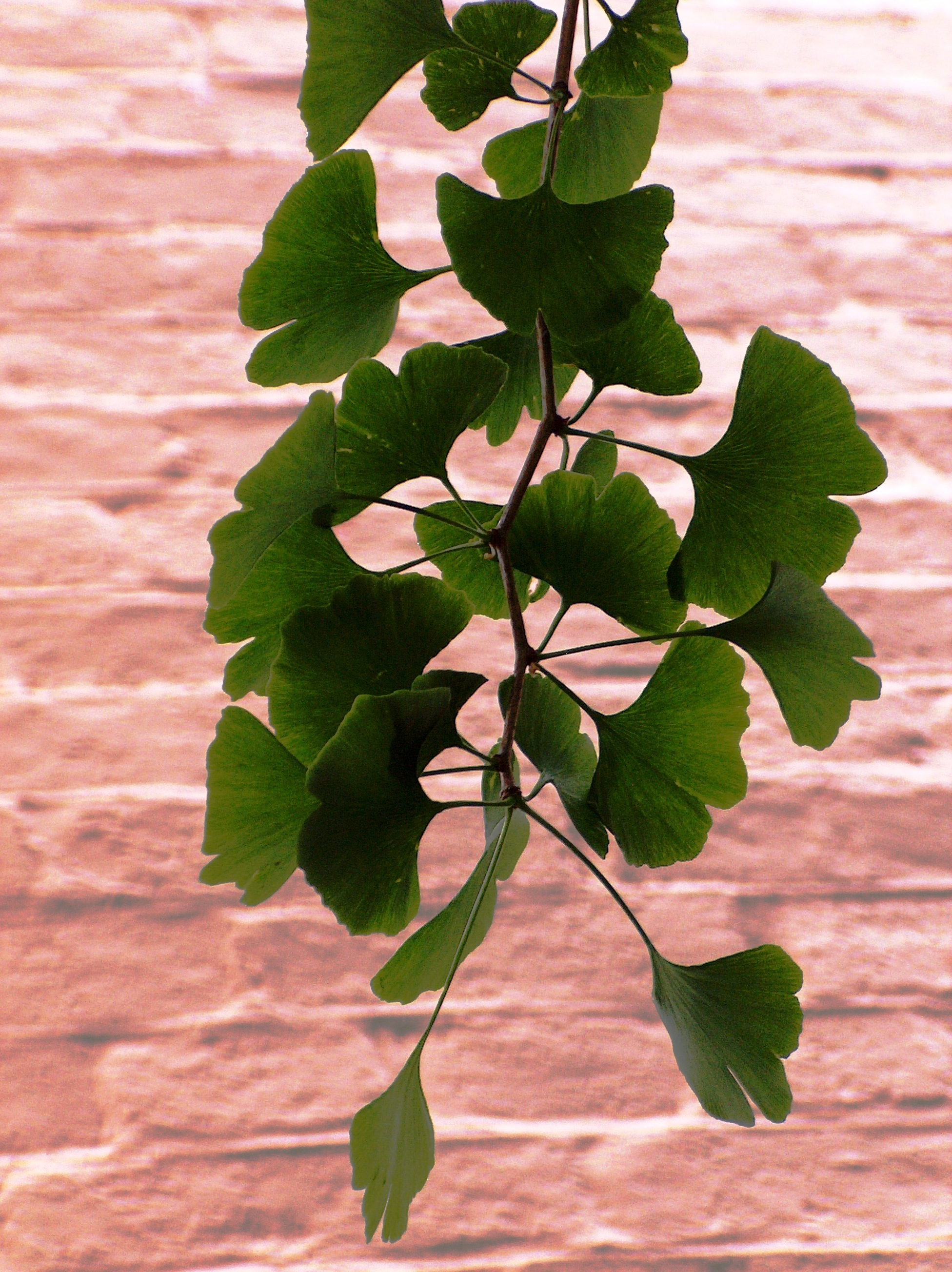 Ginkgo biloba - Leaves - Botanical Garden Bergen Museum